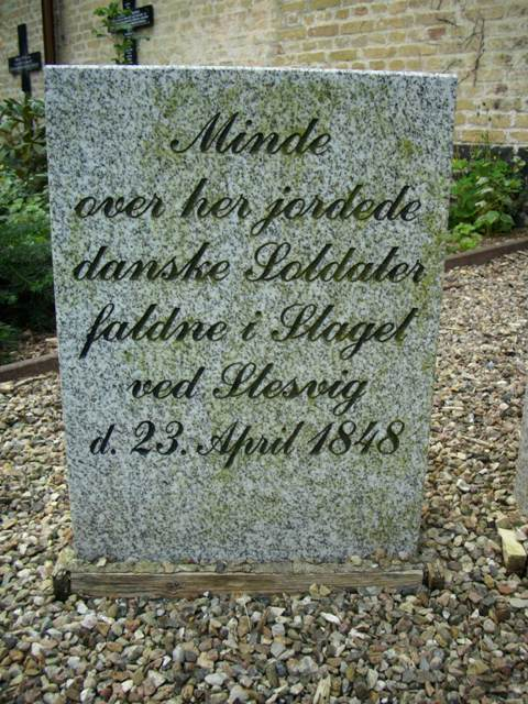 Danske soldatergrave på Frederiksberg gamle kirkegård, Slesvig by.